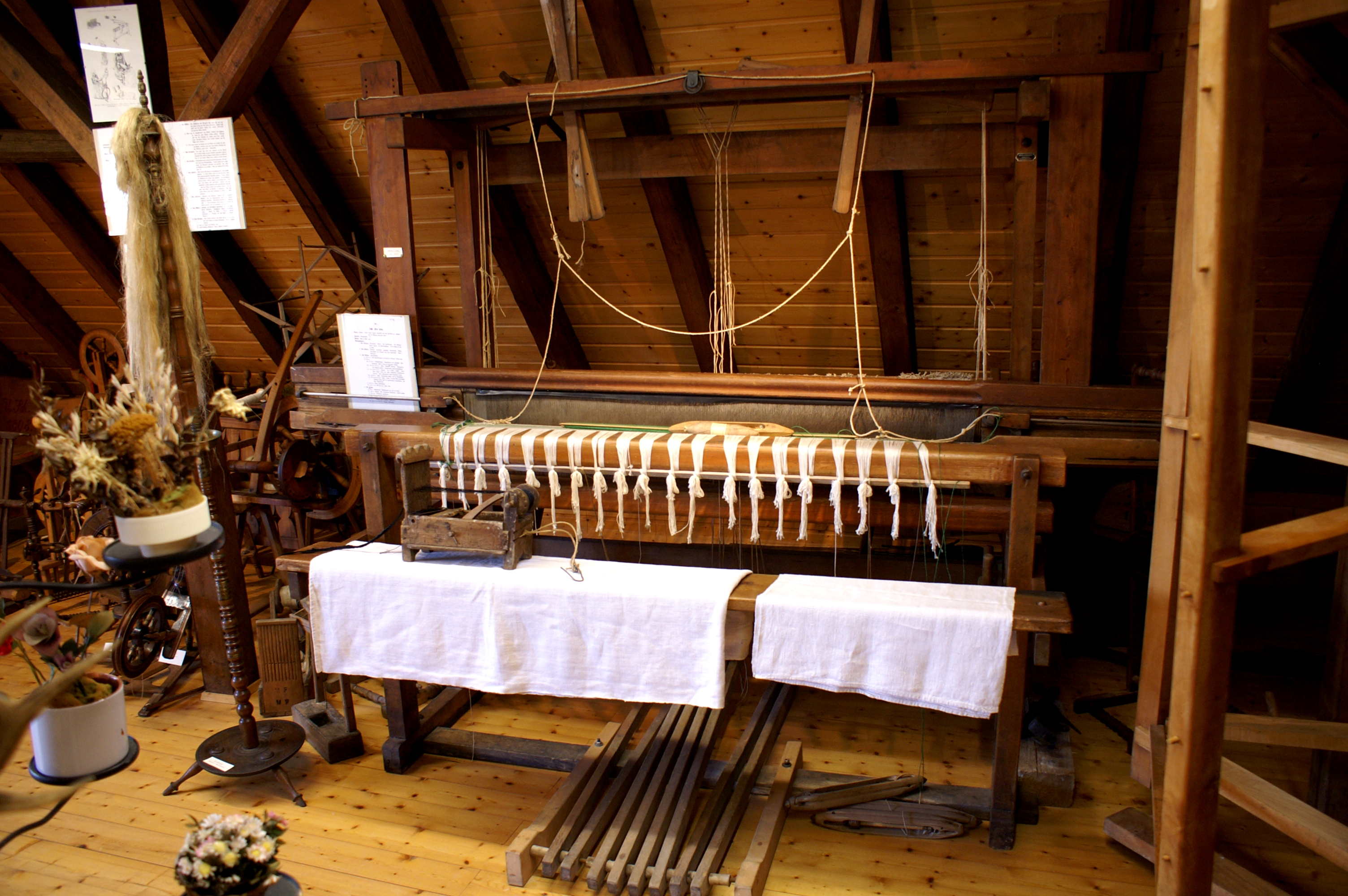 Im Nellinger Heimatmuseum wird auch über den Flachs und seine Verarbeitung auf der Schwäbischen Alb informiert. Der Flachsanbau spielte bis zum Beginn des 20. Jahrhunderts auch in Nellingen eine bedeutende Rolle.